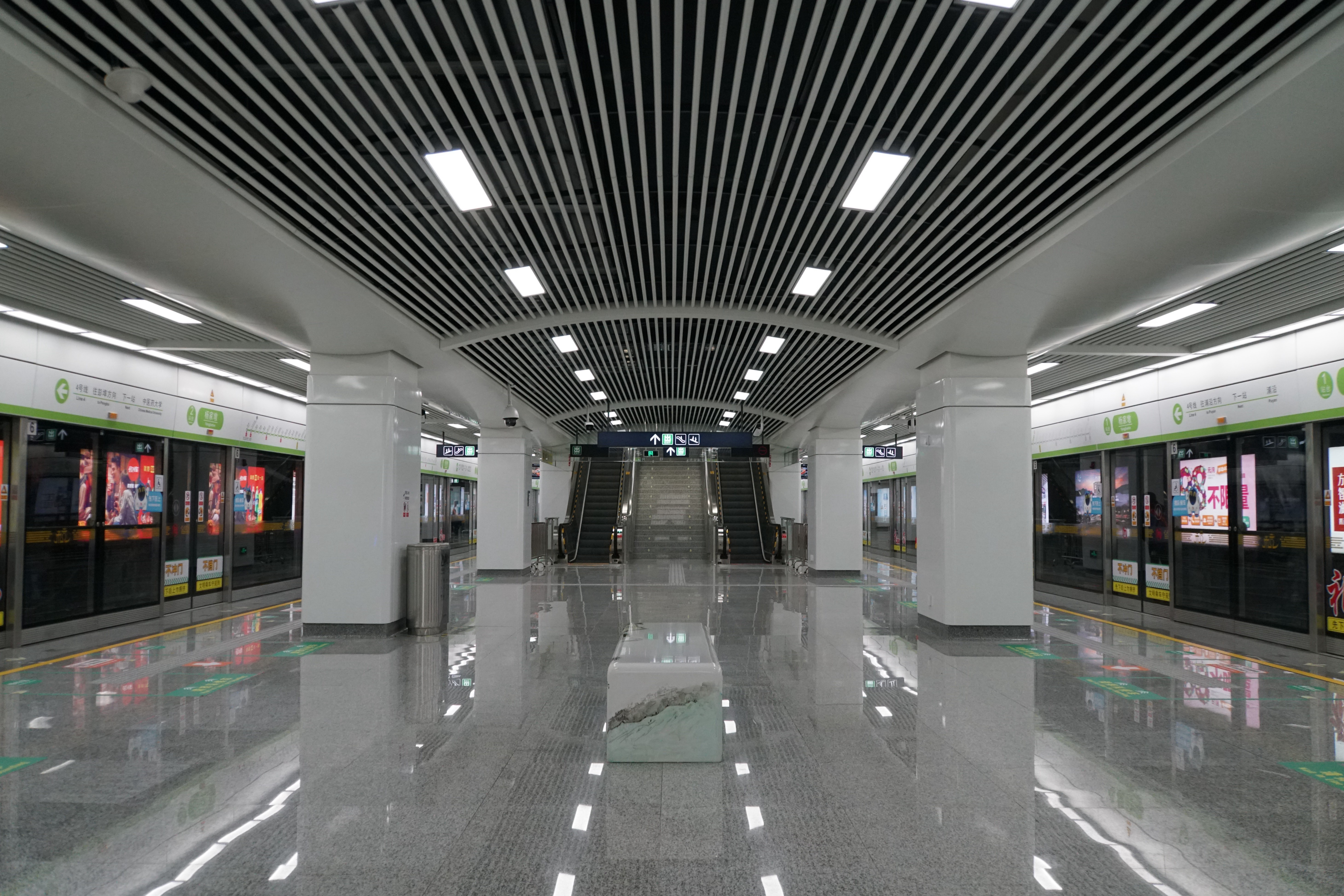 杨家墩站站台